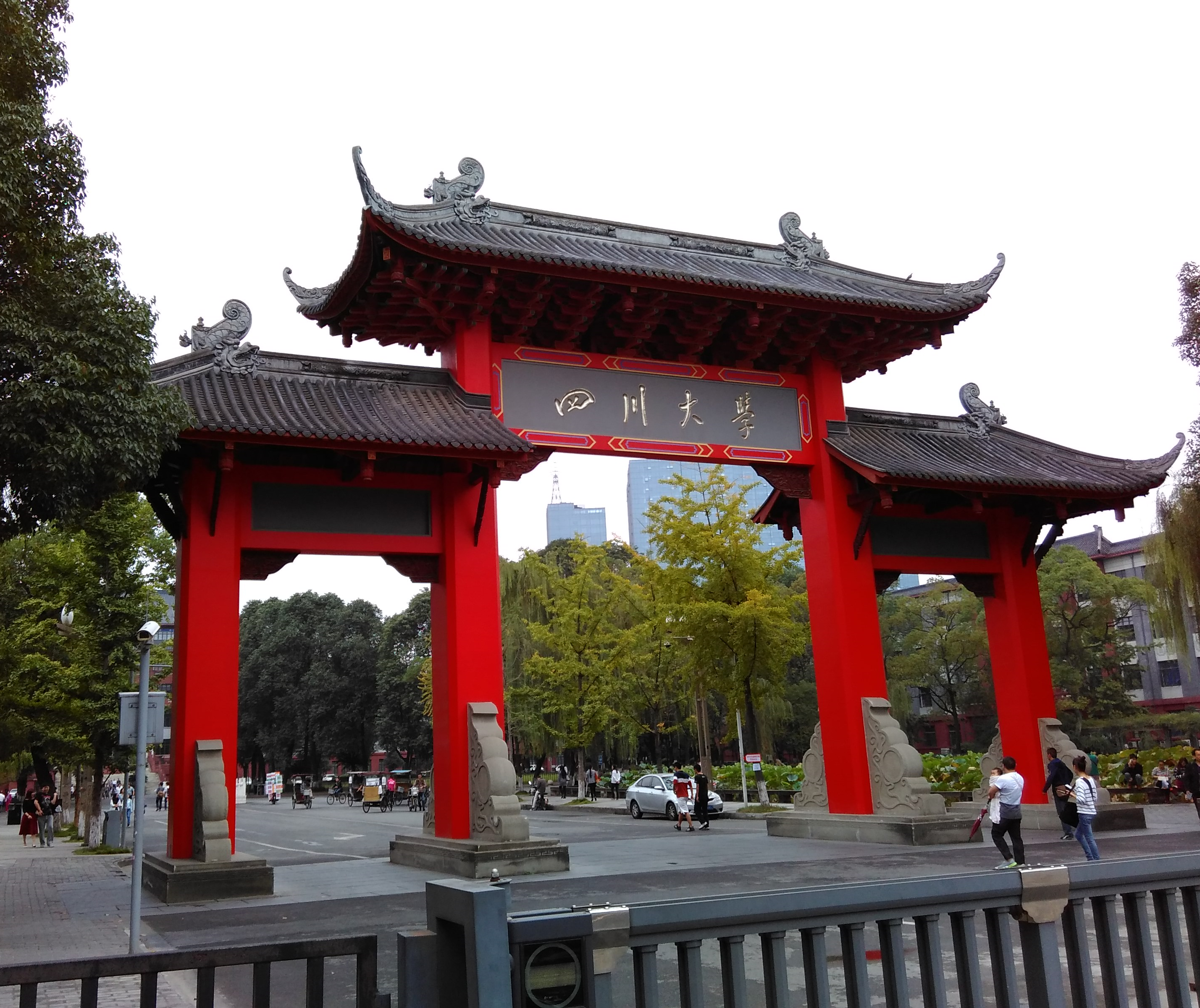 四川大學望江校區北門